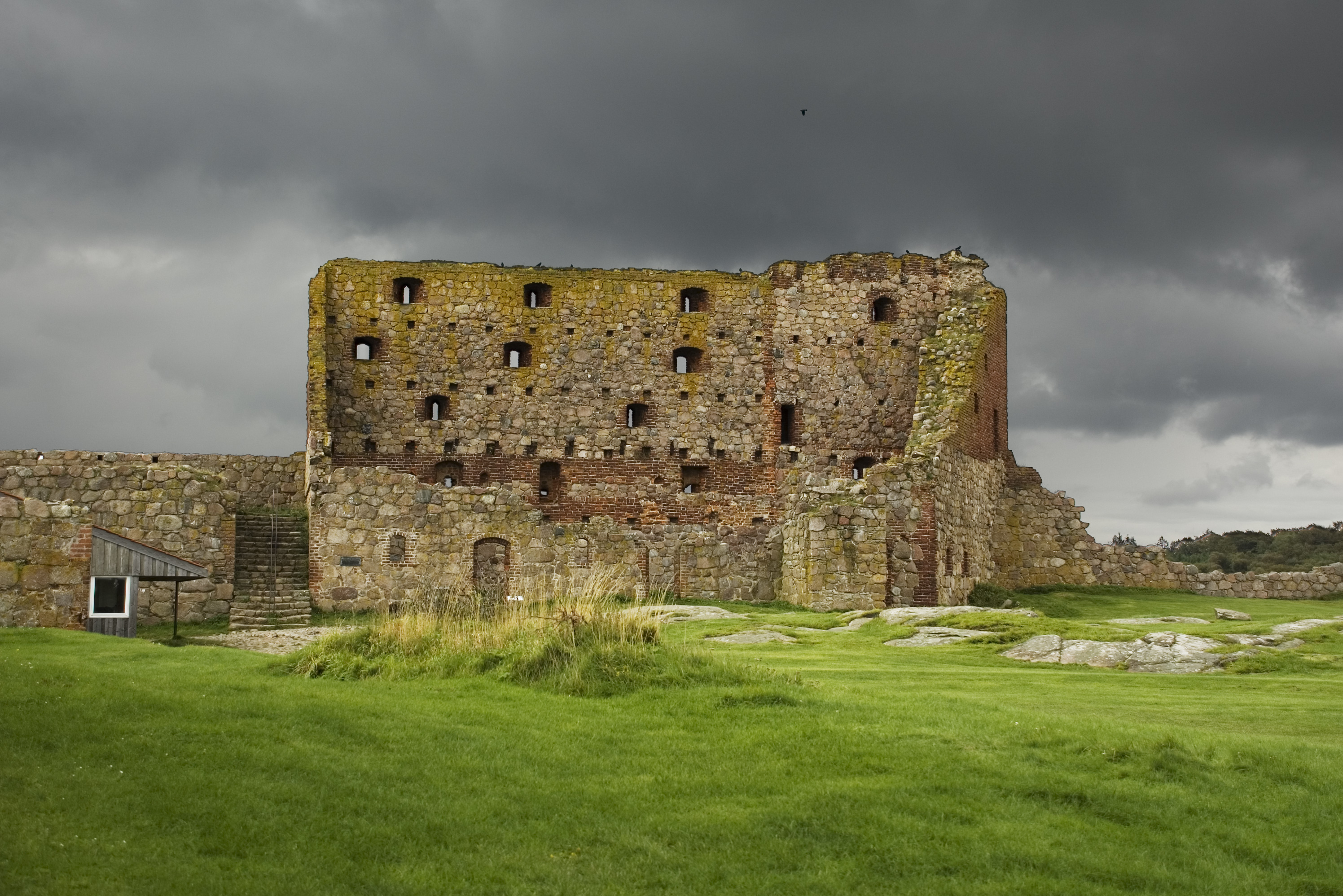 Hammershus Castle, Bornholm, Danmark / Burg Hammershus auf Bornholm (Dänemark)